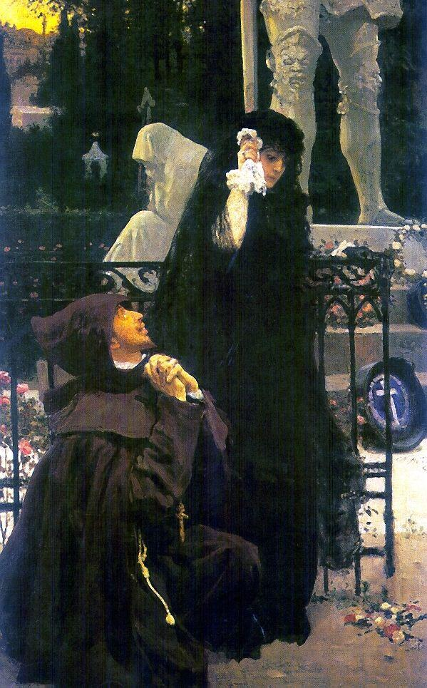 Иллюстрация к произведению А.С. Пушкина "Каменный гость"